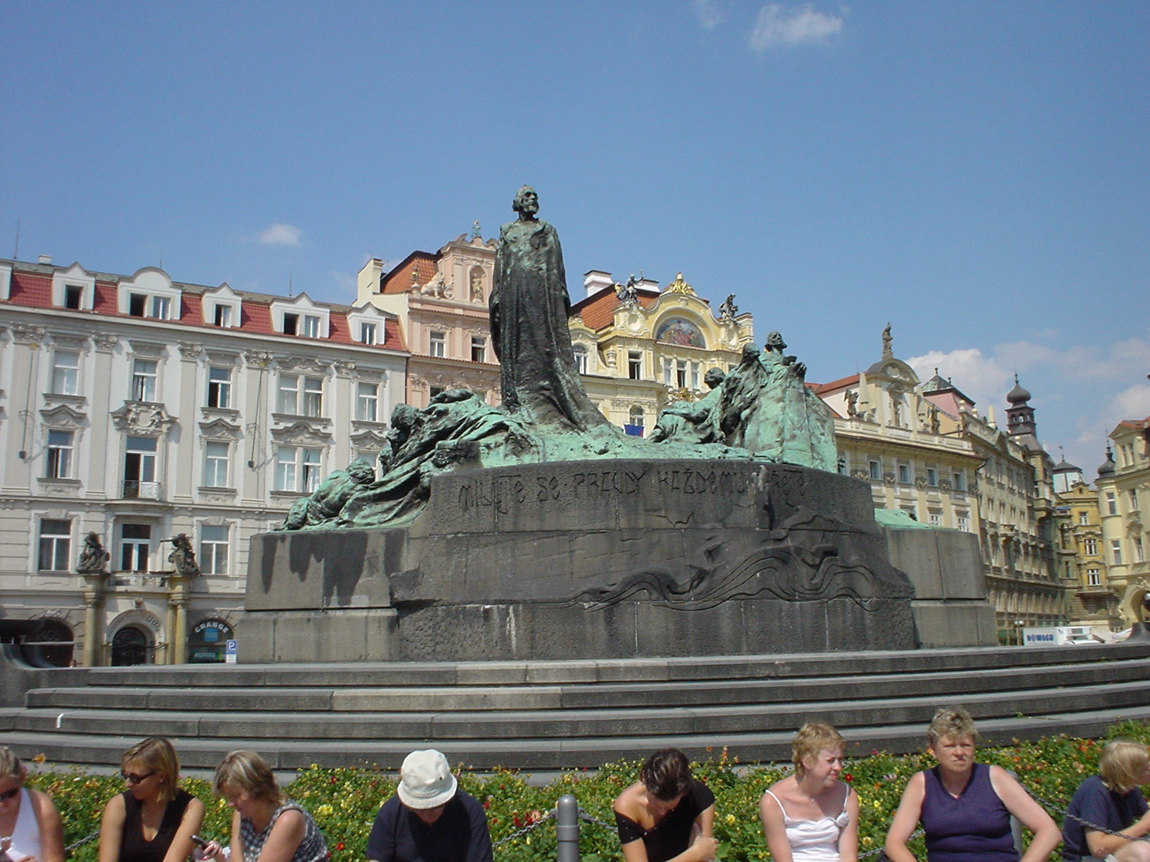 Questa foto rappresenta una vista della Piazza della Città Vecchia Praga, è stata scattata da me, G. Salluzzi nell'agosto 2004 ed è rilasciata in Pubblico Dominio